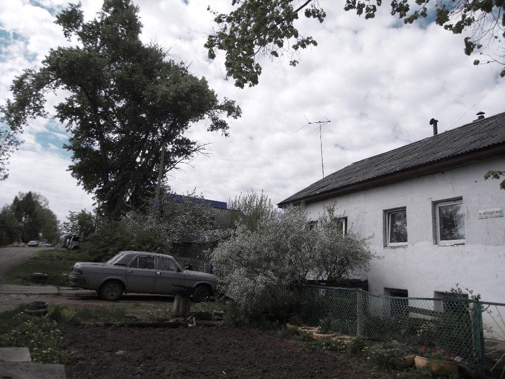 Улица Александра Верещагина в Кирове